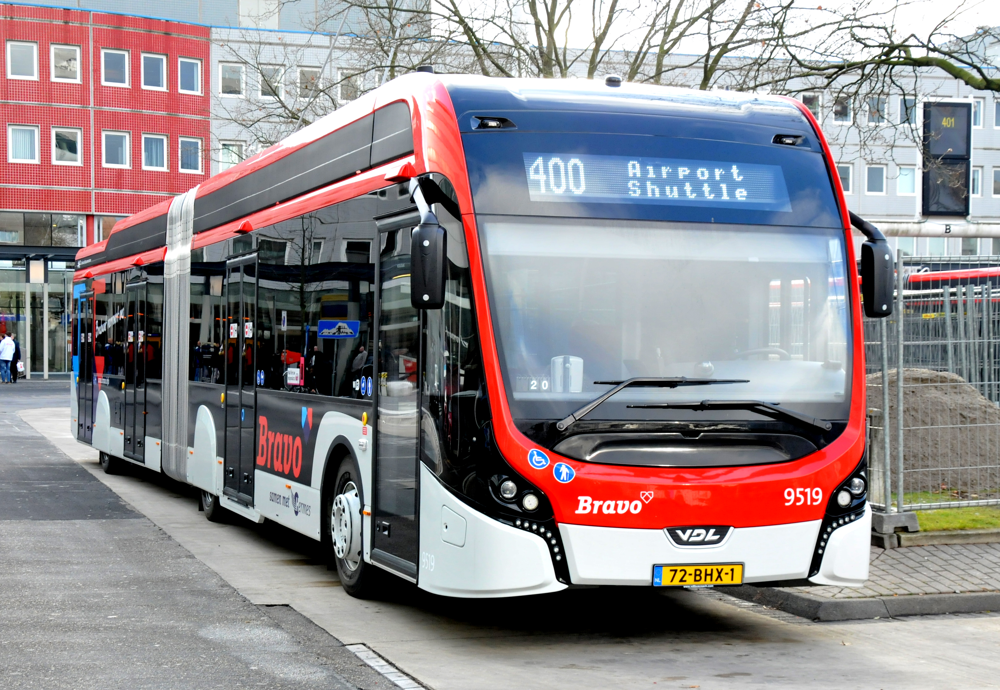 Hermes bus 9519 van het VDL type Citea SLFA 181 Electric (bj: 2016) bij busstation Eindhoven.